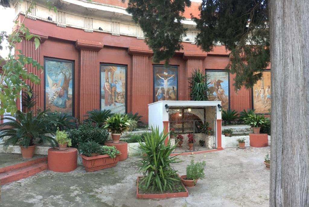 Il Calvario di Francavilla Fontana, costruito tra il 1857 e il 1881. In quest'immagine si vedono le cinque pitture al suo interno.